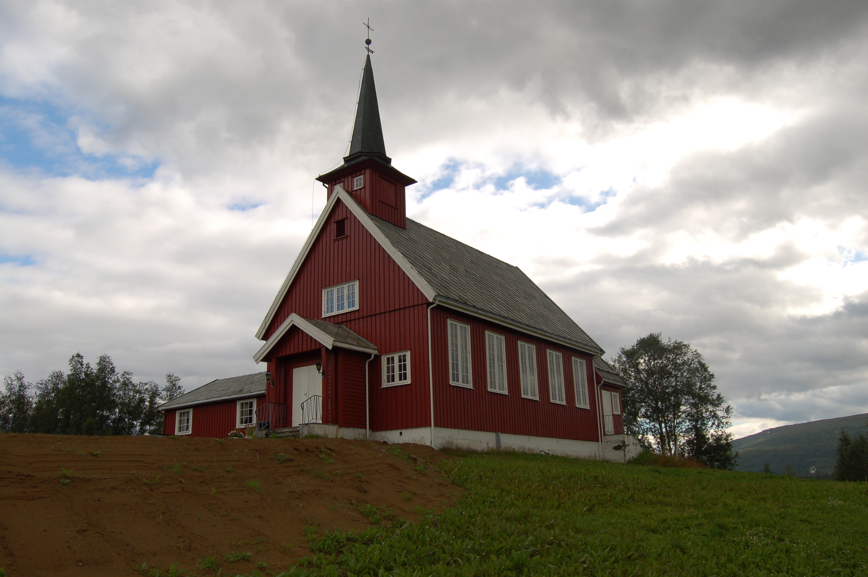 Bleikvassli kirke, Hemnes